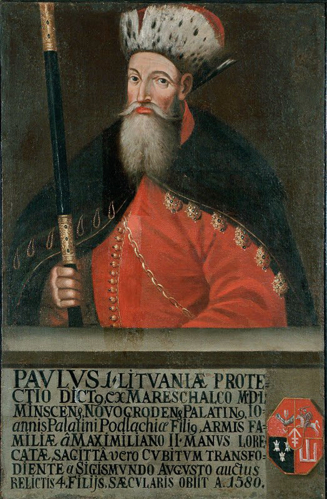 Беларуская (тарашкевіца): Партрэт Паўла Сапегі (Pavał Sapieha) гербу «Ліс» (каля 1490 — 1579), дзяржаўнага і вайсковага дзеяча Вялікага Княства Літоўскага, ваяводы падляскага і наваградзкага.